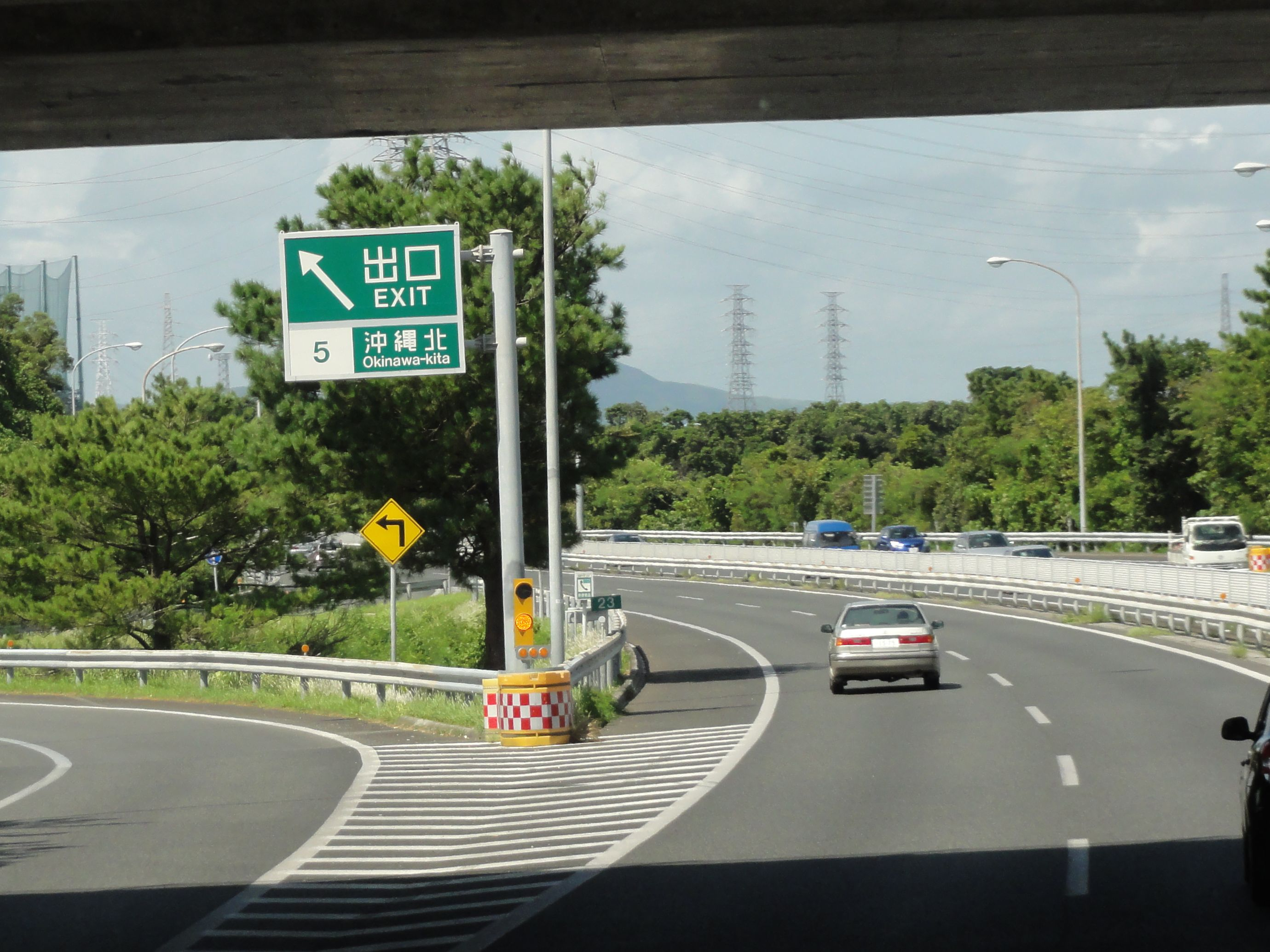 沖縄北インターチェンジ